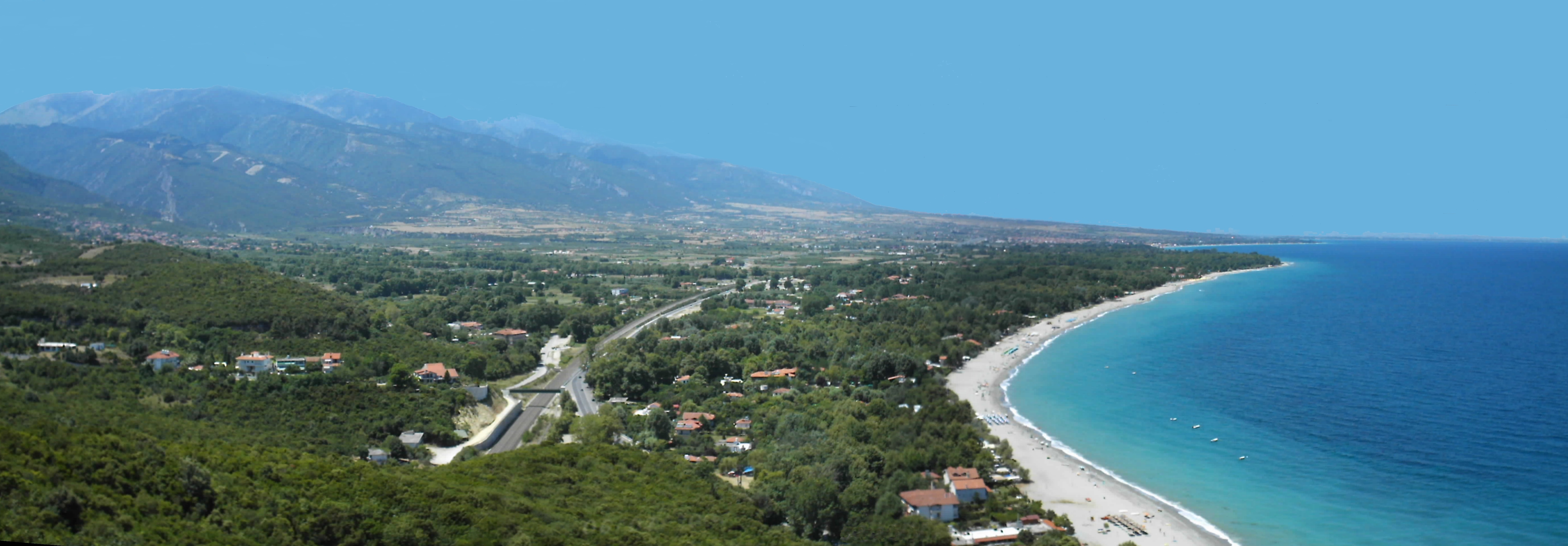 Kastro tou Platamona